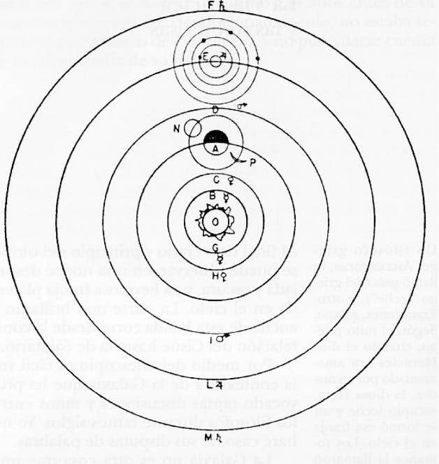 Nome original: Sistema Autor: Galileu Galilei Data de criação: Desconhecida Material: Simples rascunho em papel comum Local da imagem